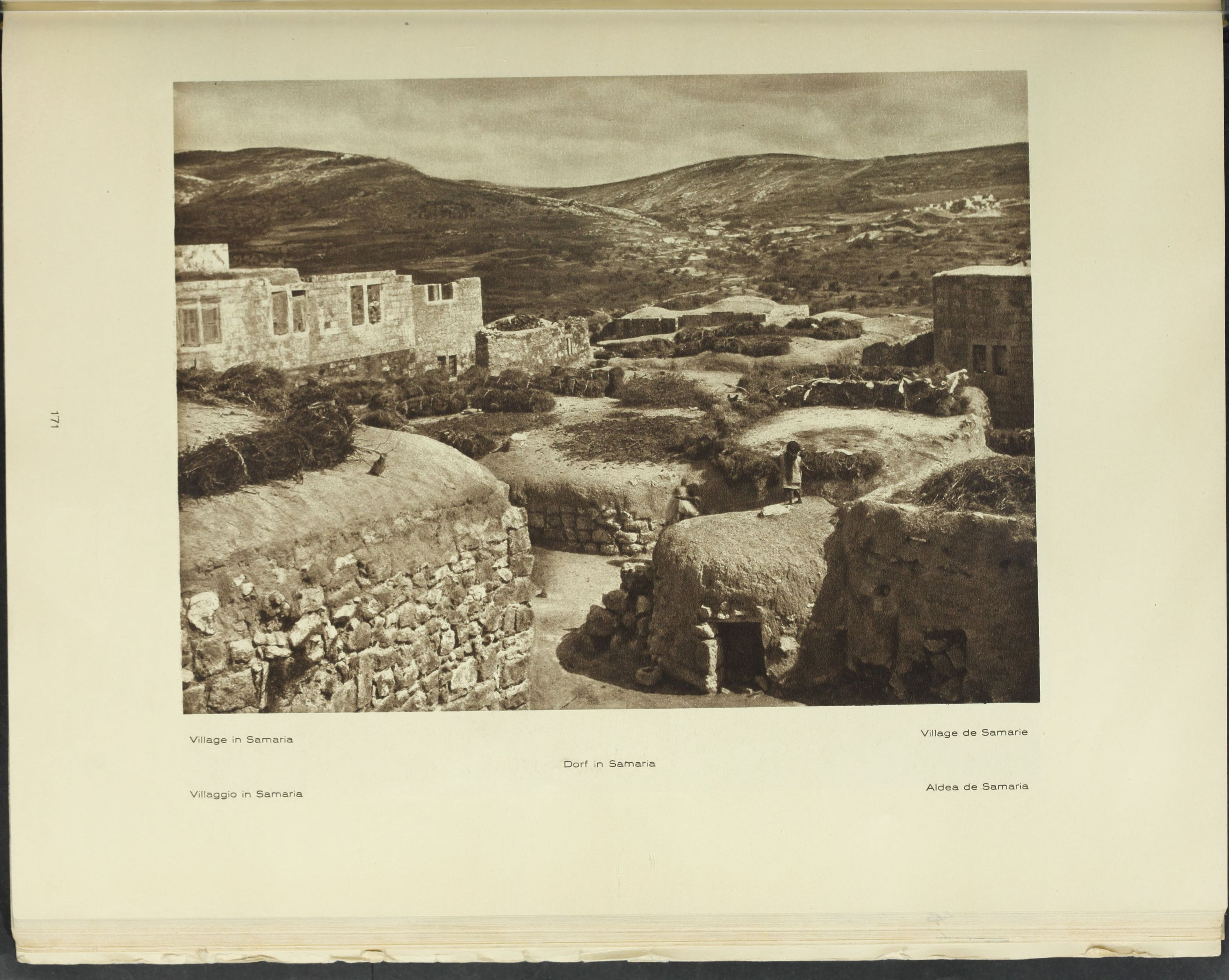 Picturesque Palestine Arabia and Syria (19